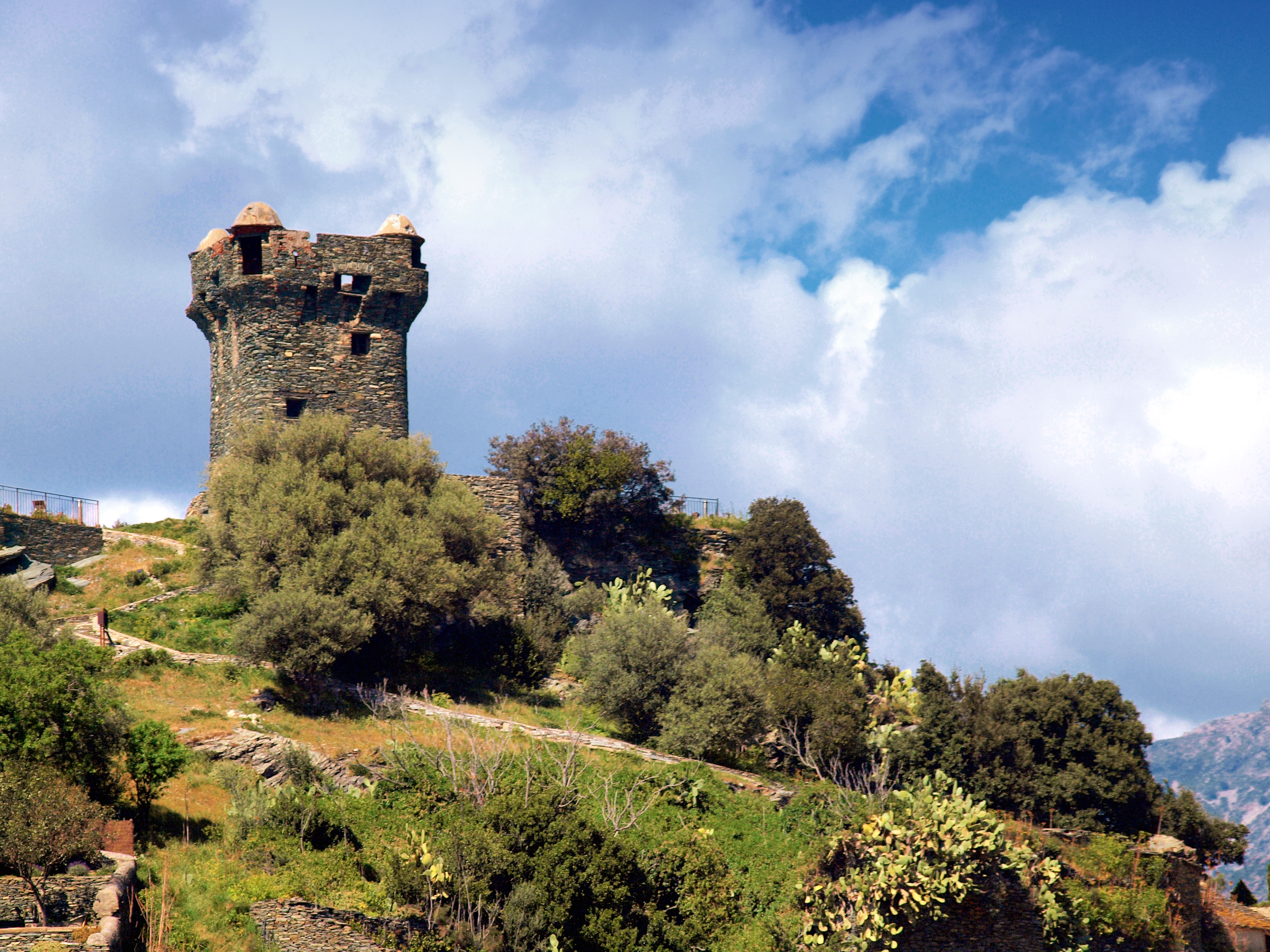 Nonza (Corsica) - Tour de Nonza ou Torra paolina